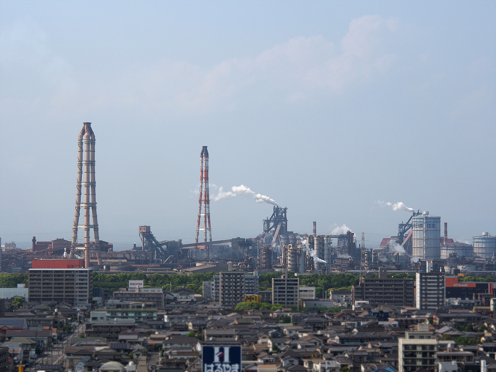 新日鐵住金大分製鐵所（大分県大分市）